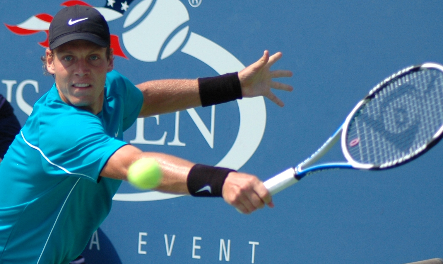 Tomas Berdych US Open 2009